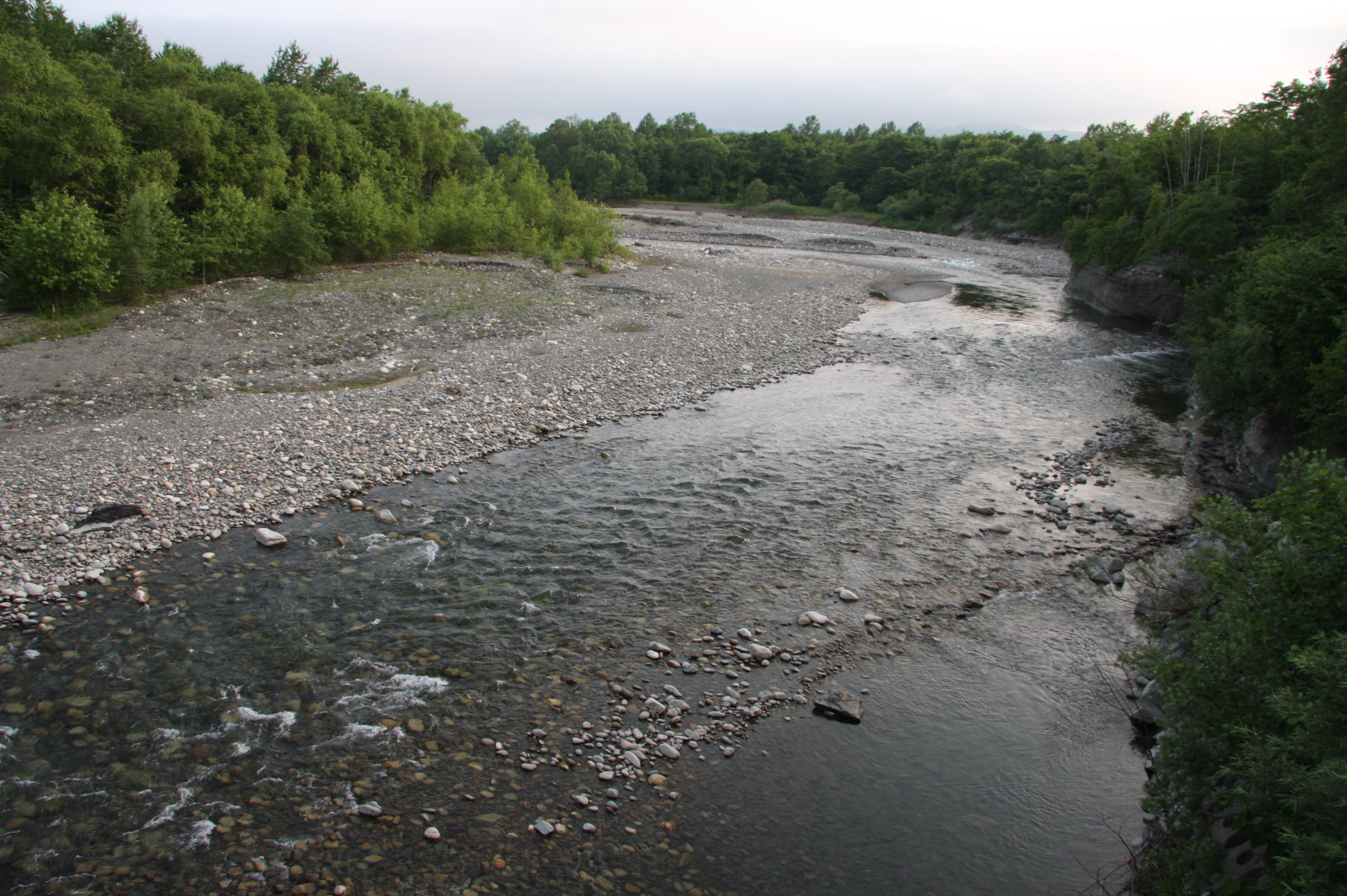 戸蔦別川 戸蔦大橋より上流を望む